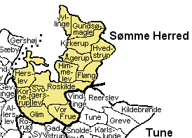 Sømme Herred Roskilde Amt , Denmark. Map by Svend-Erik Christiansen, edited by user:Nico-dk .